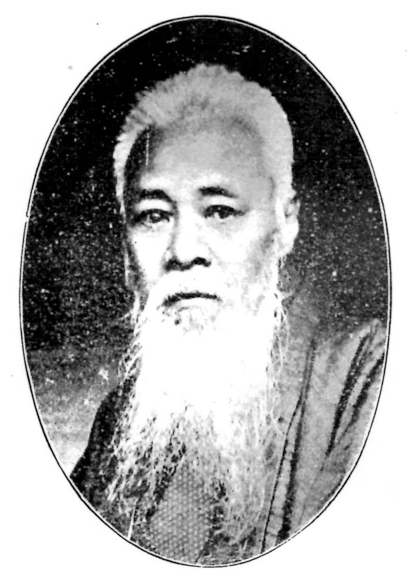 明治期の漢詩文集『百花欄』第十六集の巻頭に掲載される。